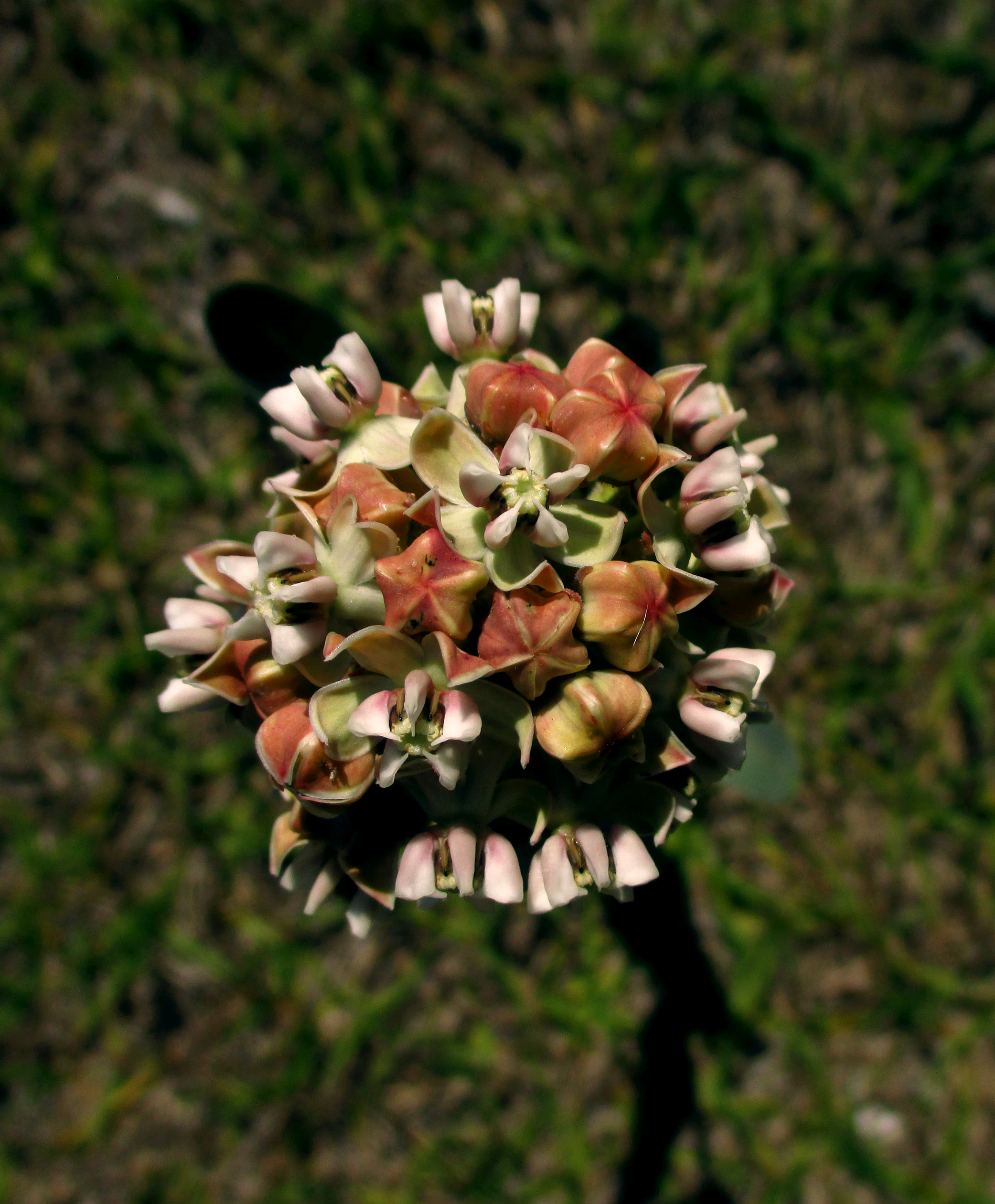 Asclepias glaucescens la flor